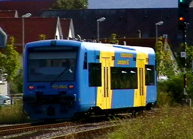 Radwandershuttle der Hohenzollernbahn bei Ausfahrt aus dem Bahnhof Balingen in Richtung Schömberg.